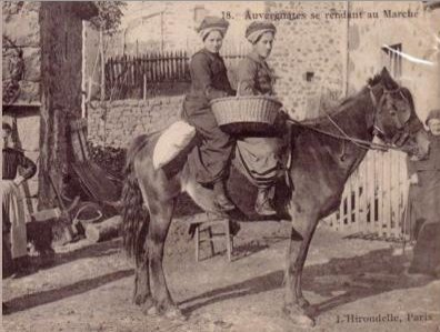 Auvergnates se rendant au marché, photographie de la fin du XIXe siècle